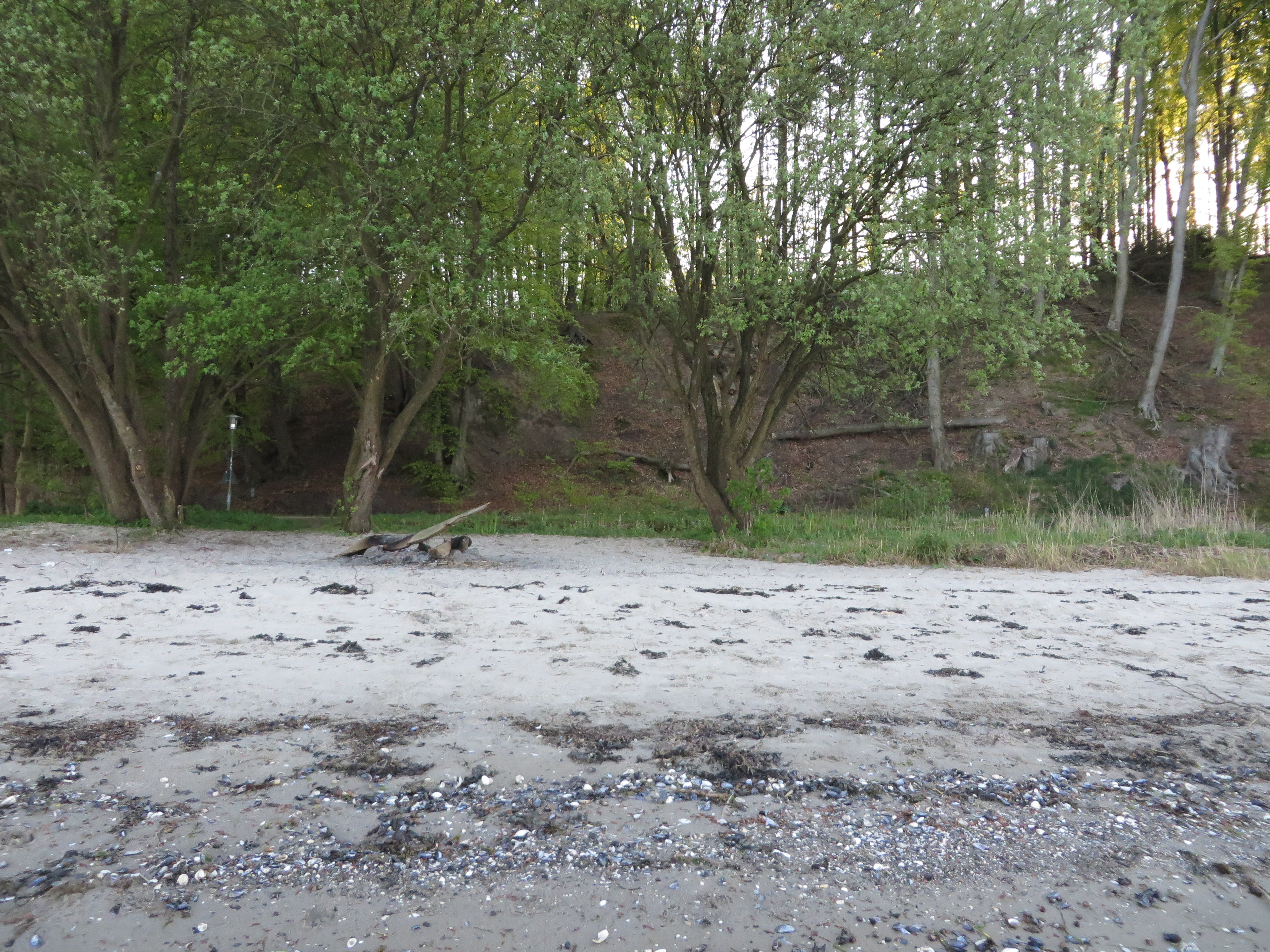 Eine alte Lagerfeuerstelle am Strand von Ostseebad, mit Strand und Hang